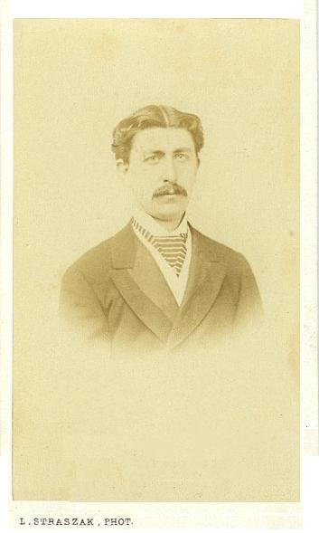 le comte Eugène Goblet d'Alviella (1846-1925)